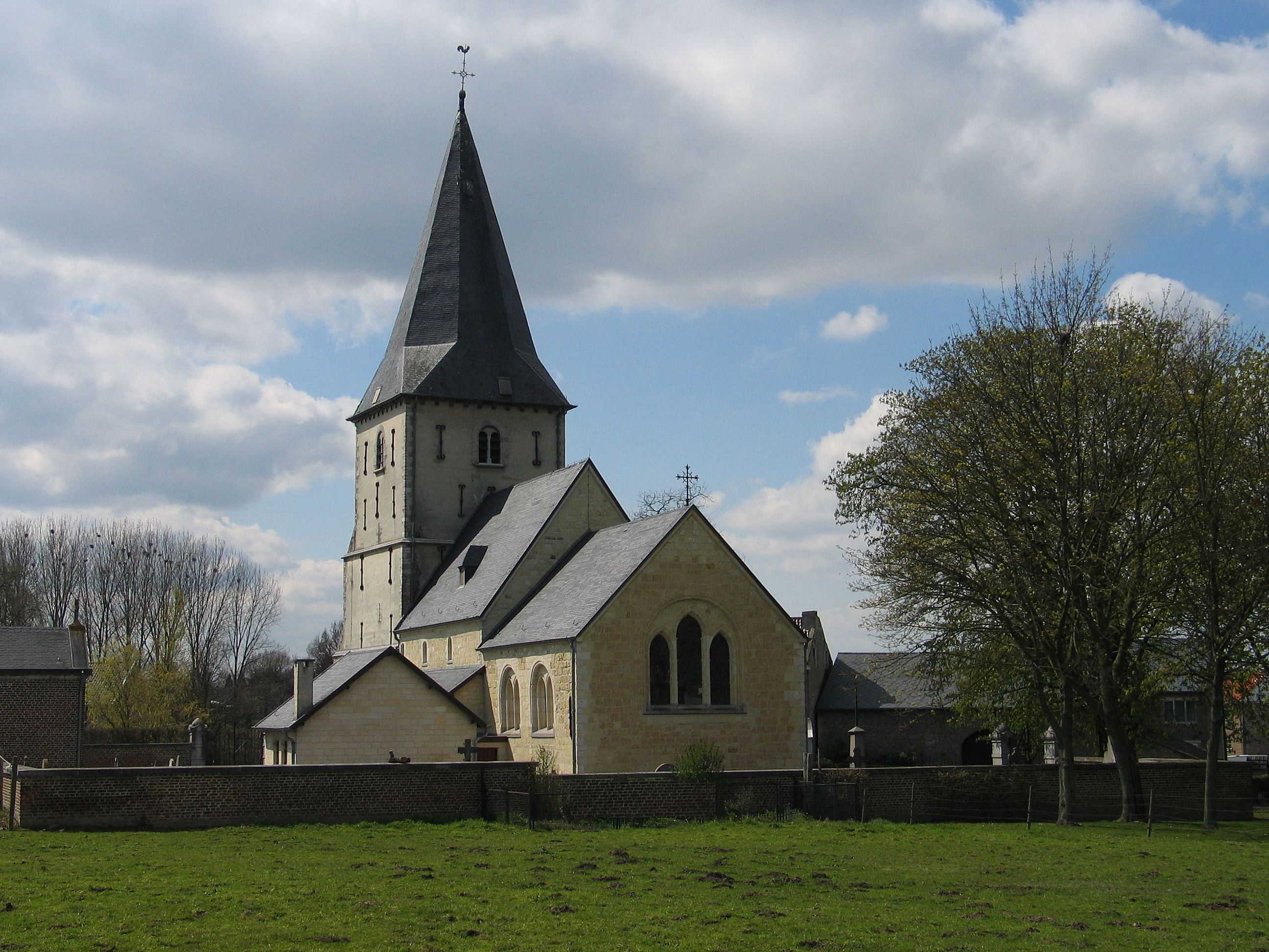 de Sint-Amanduskerk in Wezeren, België, zeldzaam voorbeeld van gotisch-romaanse overgangsstijl